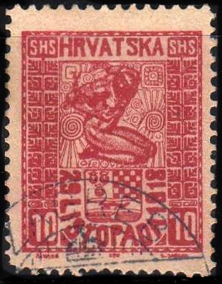 Почтовая марка Королевства СХС (Загребская дирекция). Освобождённая Хорватия